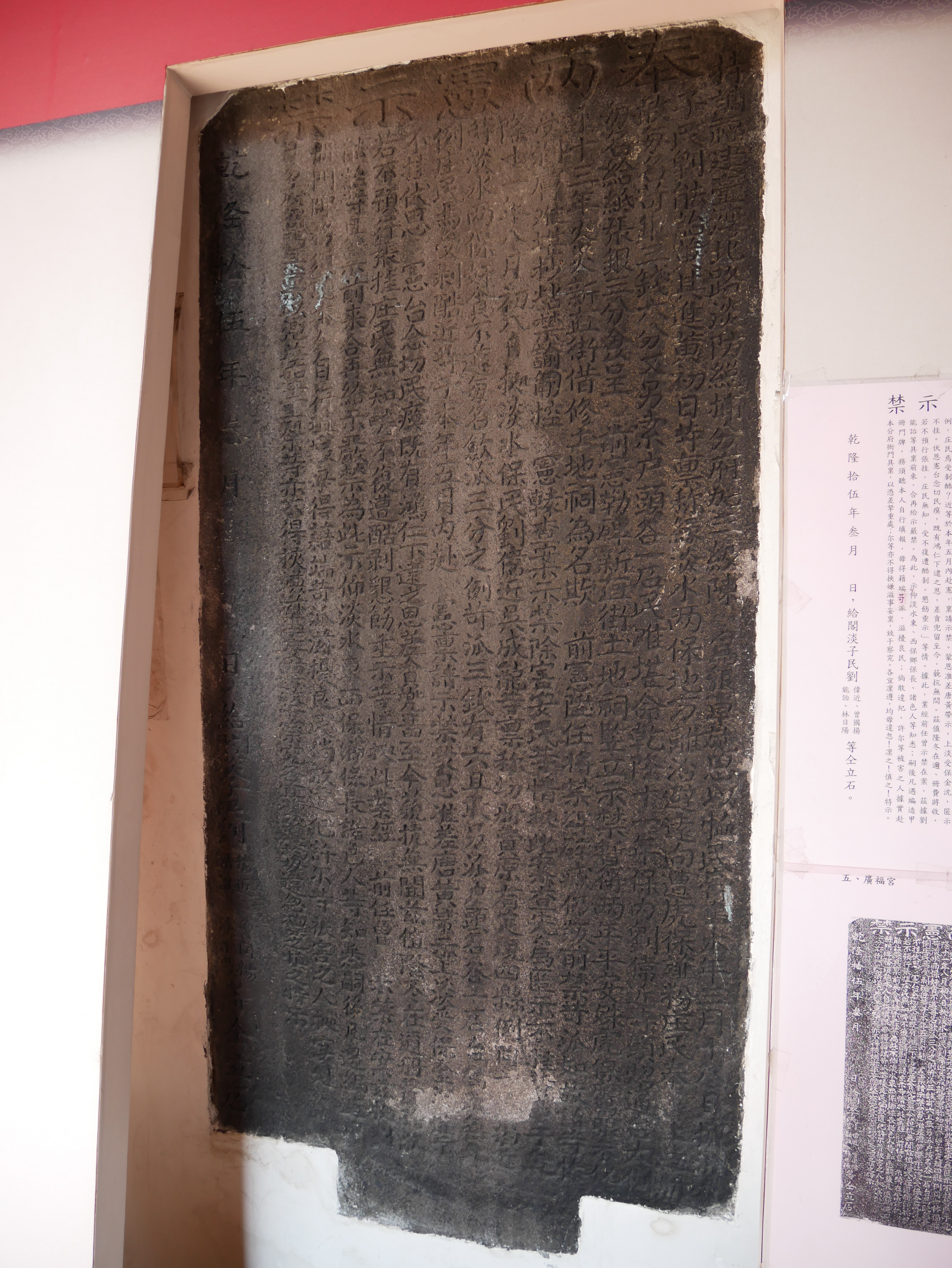 中文（台灣）: 嚴禁差役藉端苛派擾民碑記（乾隆拾伍年參月），新北市新莊區文德里